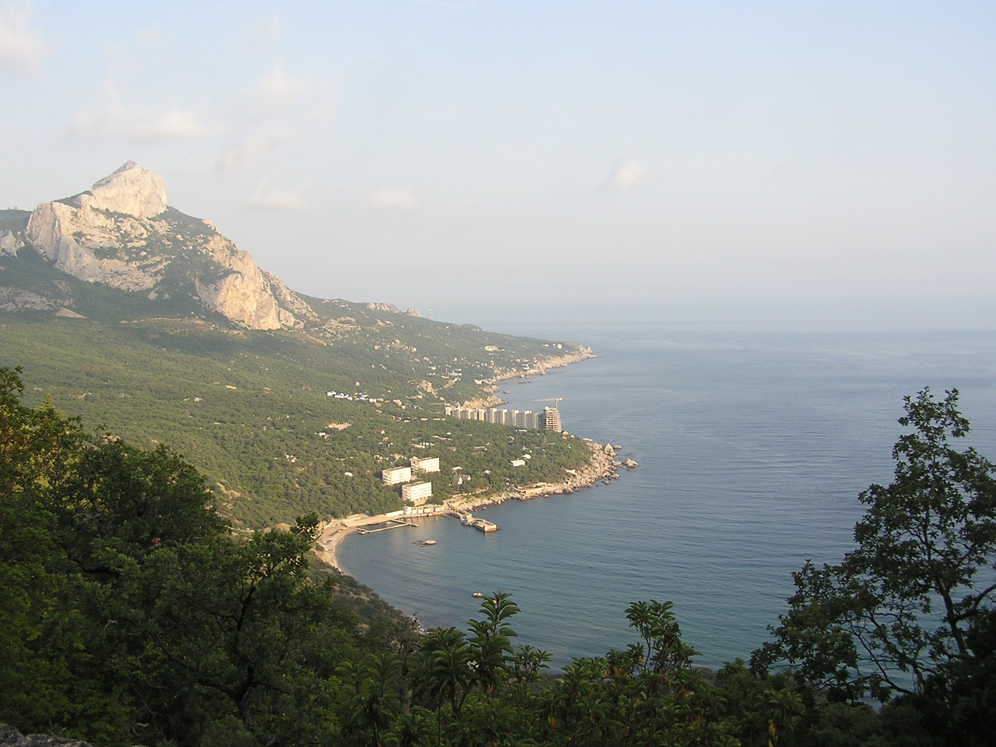 Ласпи